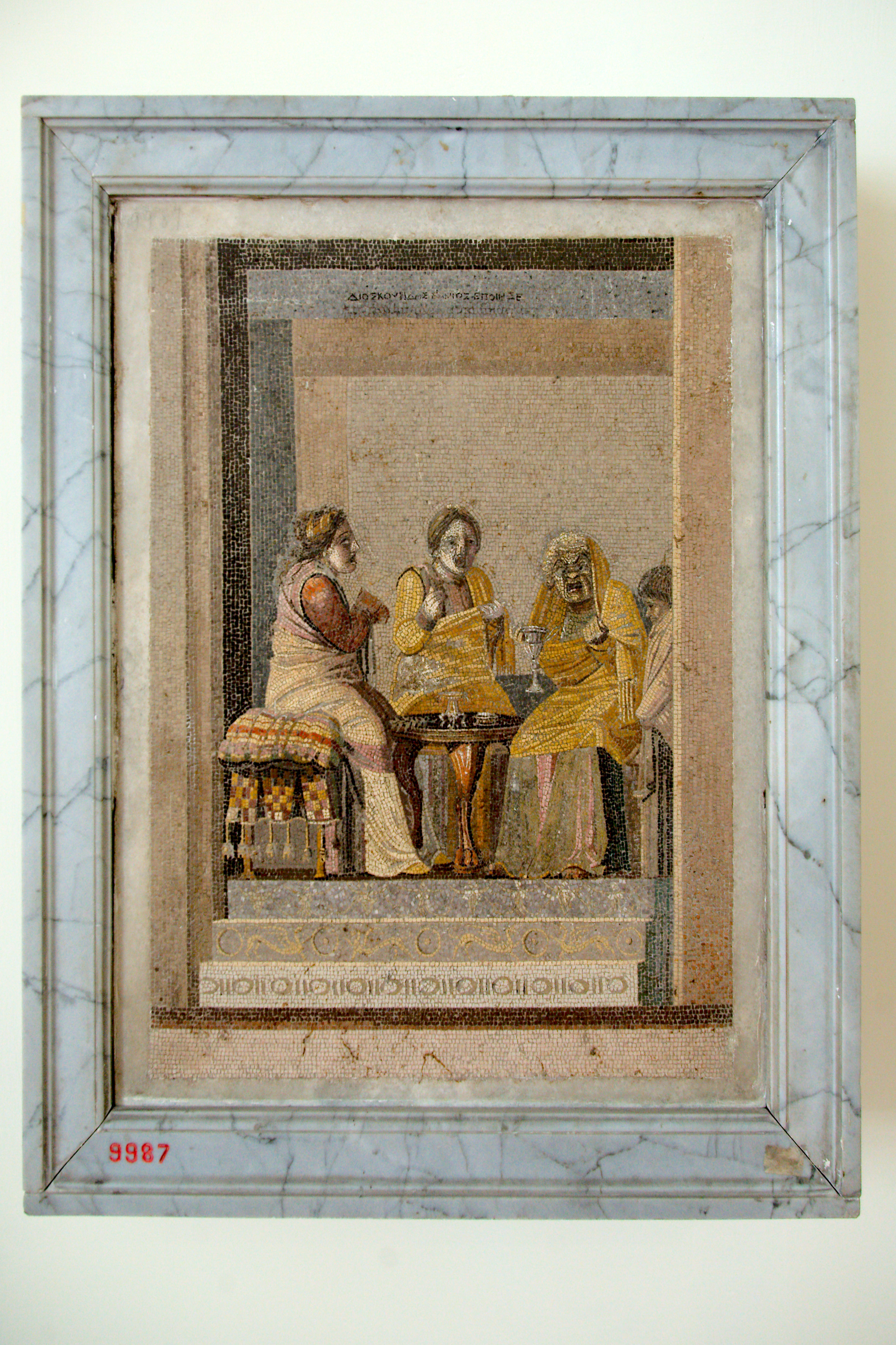 Mosaics from Pompeii (Villa del Cicerone) in the Museo Archeologico Nazionale in Naples